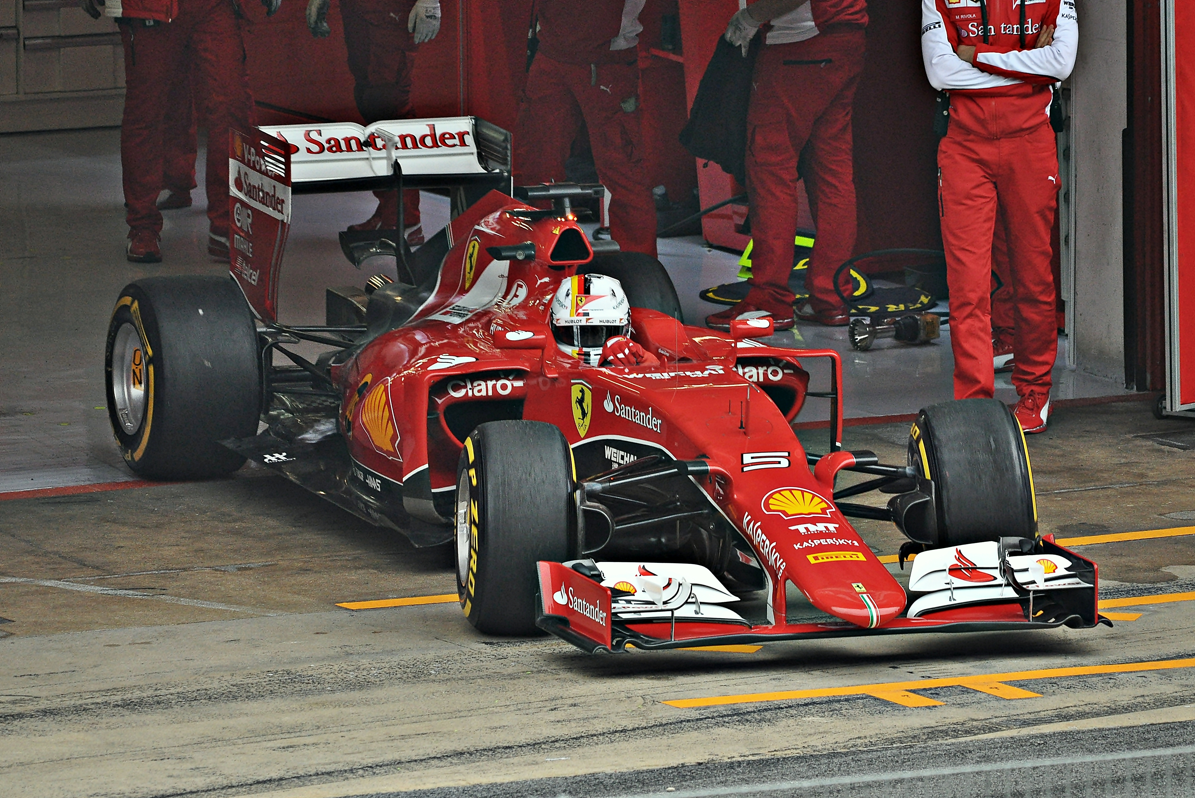 Test days Barcelona 2015